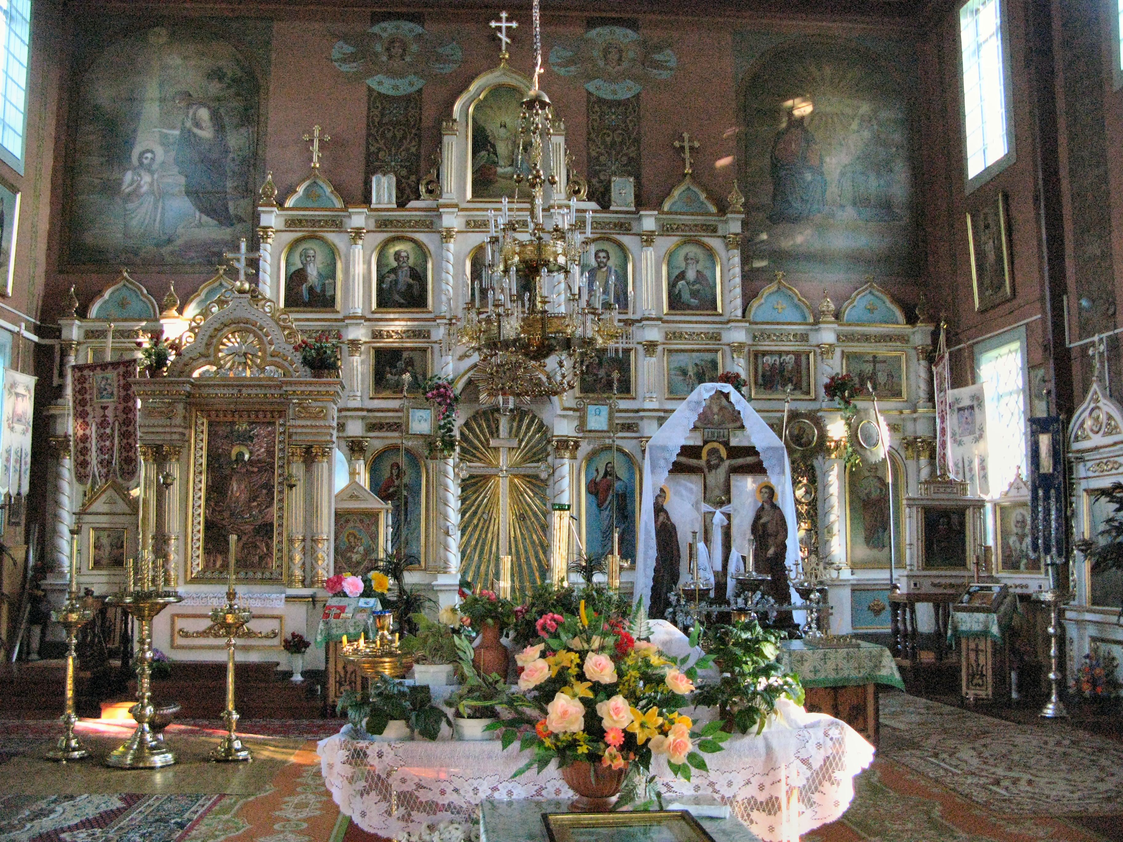 zespół cerkwi prawosławnej par. p.w. Opieki Matki Bożej - Cerkiew prawosławna par. p.w. Opieki Matki Bożej, drewn., 1913-1918 - cmentarz - ogrodzenie z kapliczkami i bramą Puchły, Narew 02.2003.